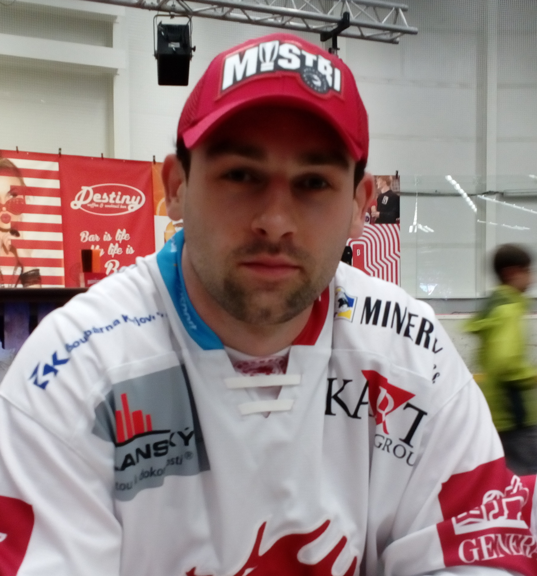 Po zakončení sezóny 2018/19 v malé Werk Areně